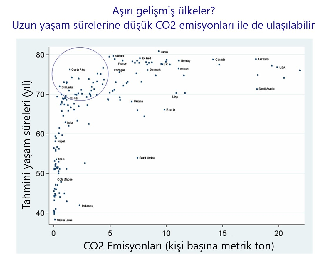 Ruhsal Düzey: Neden Daha Eşit Toplumlar Neredeyse Her Zaman Daha İyidir